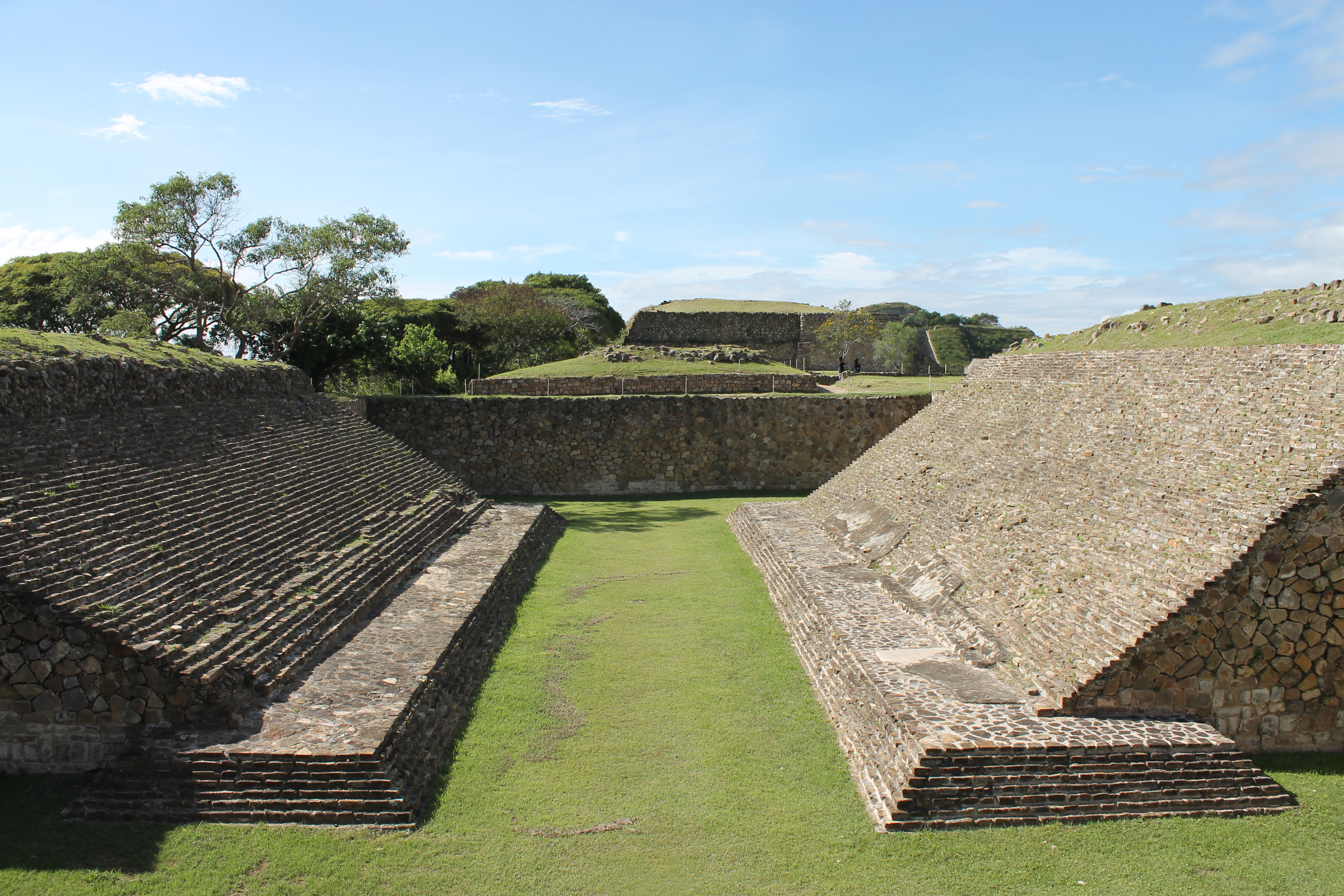 Vista del juego de pelota ubicado en la zona arqueológica de Monte Albán. Se aprecia el campo del juego de pelota desde uno de los extremos.